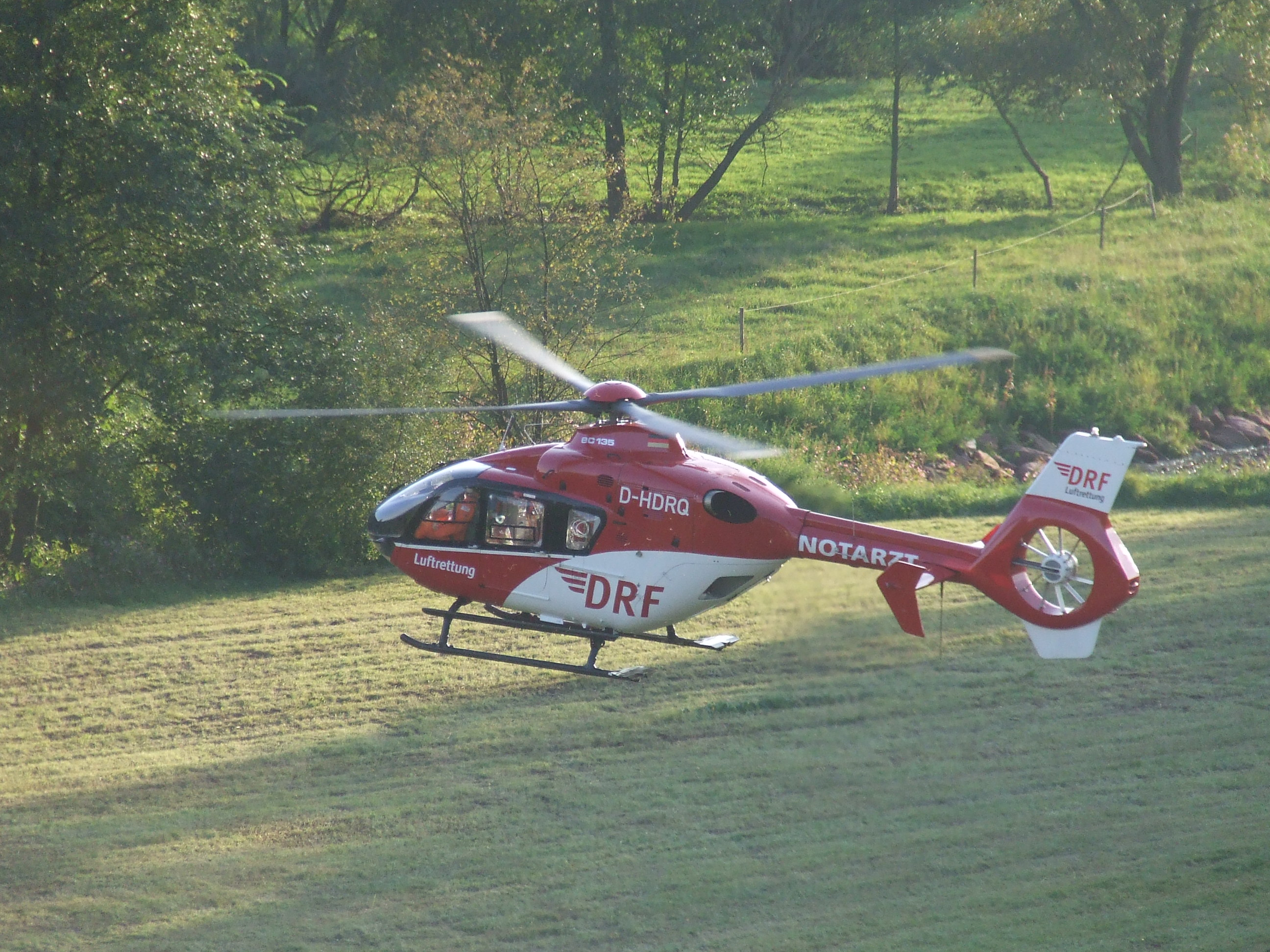 Christoph 18 im September 2010, damals vom Typ Eurocopter EC-135P2+ mit dem Luftfahrzeugkennzeichen D-HDRQ